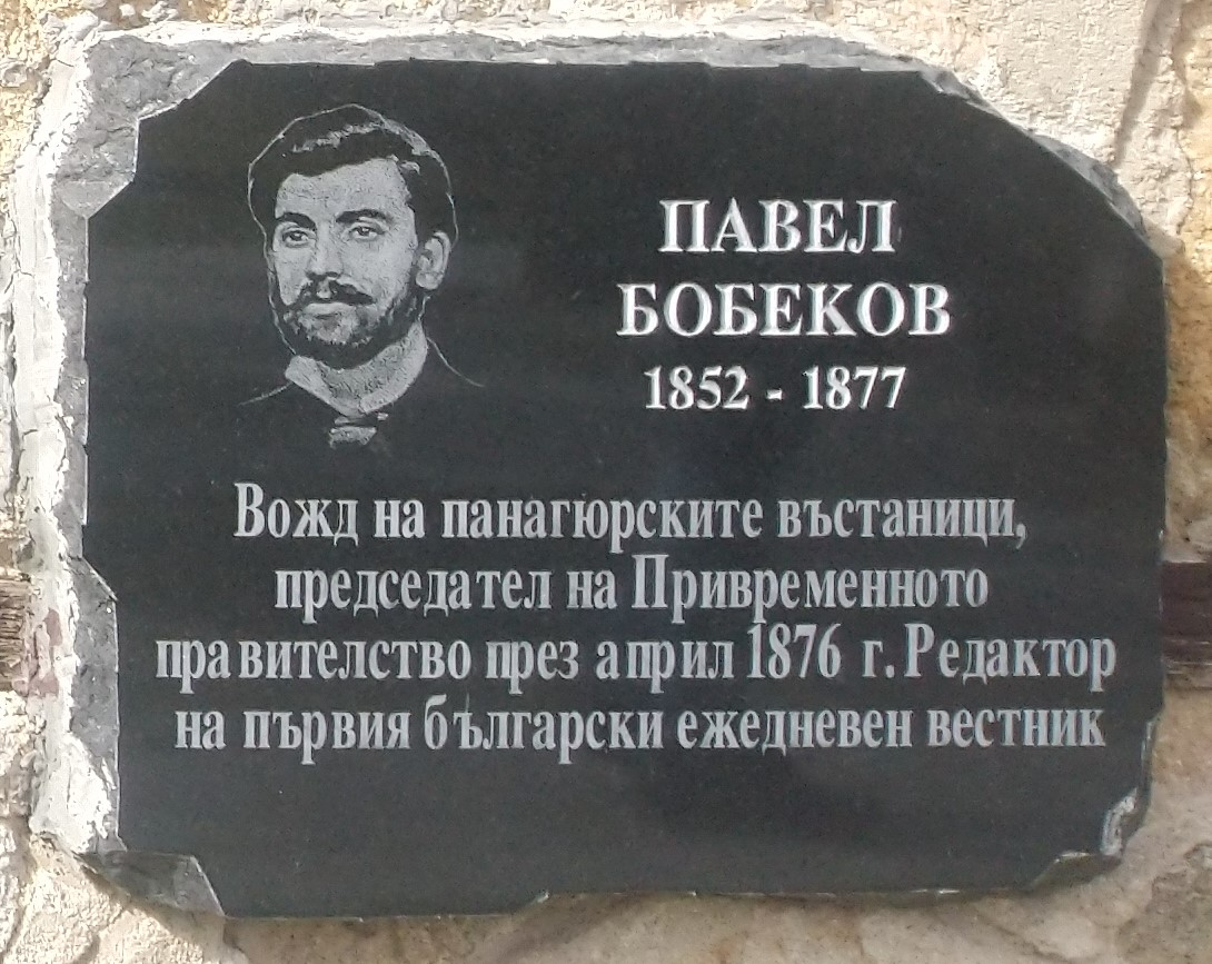 Павел Бобеков (1852 - 1877) - плоча в Исторически музей Панагюрище - Надпис: Вожд на панагюрските въстания, председател на Привременното правителство през април 1876 г. Редактор на първия български ежедневен вестник.